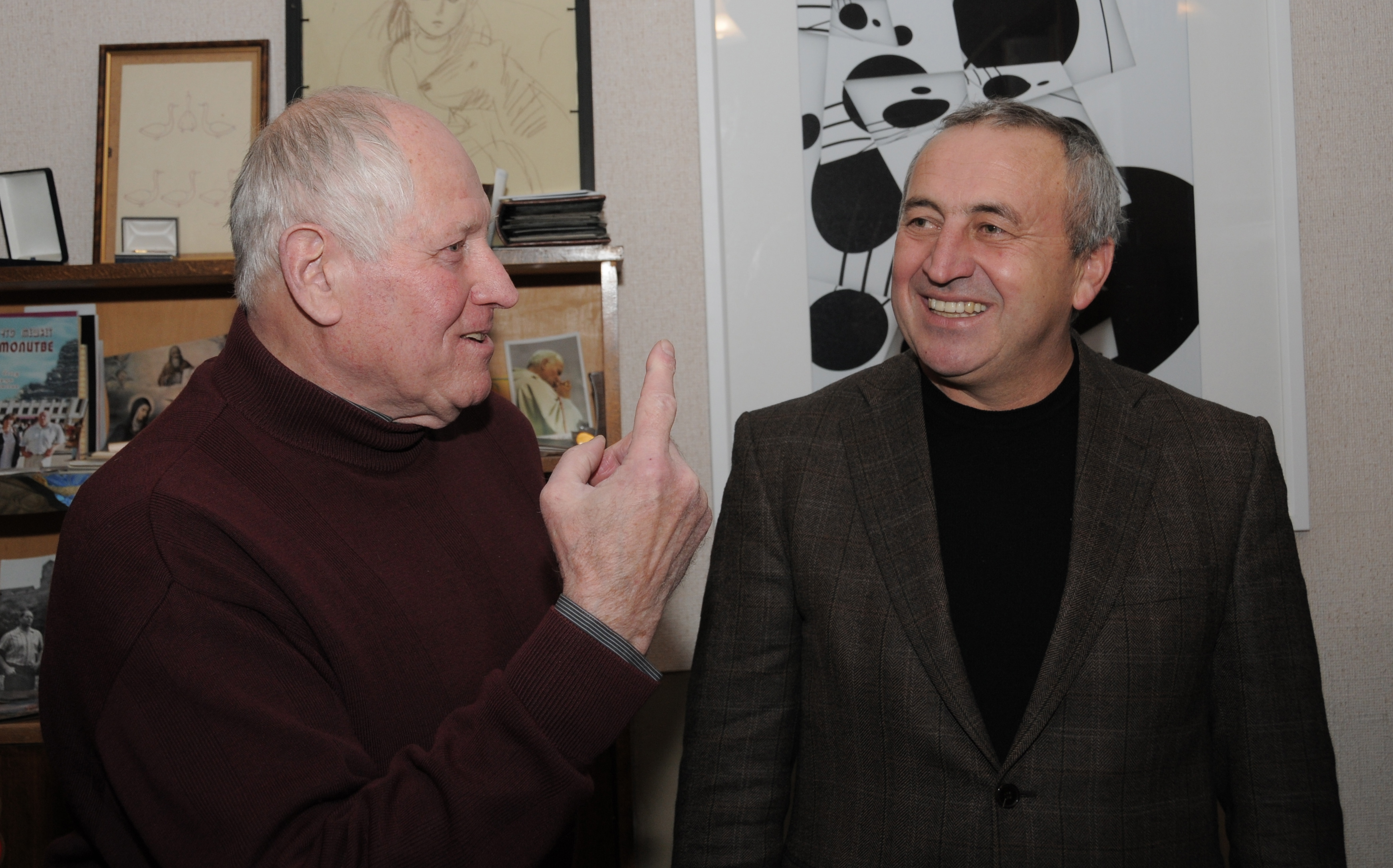 Дмитрий Горбачев и Владимир Цвиль, январь 2013 года